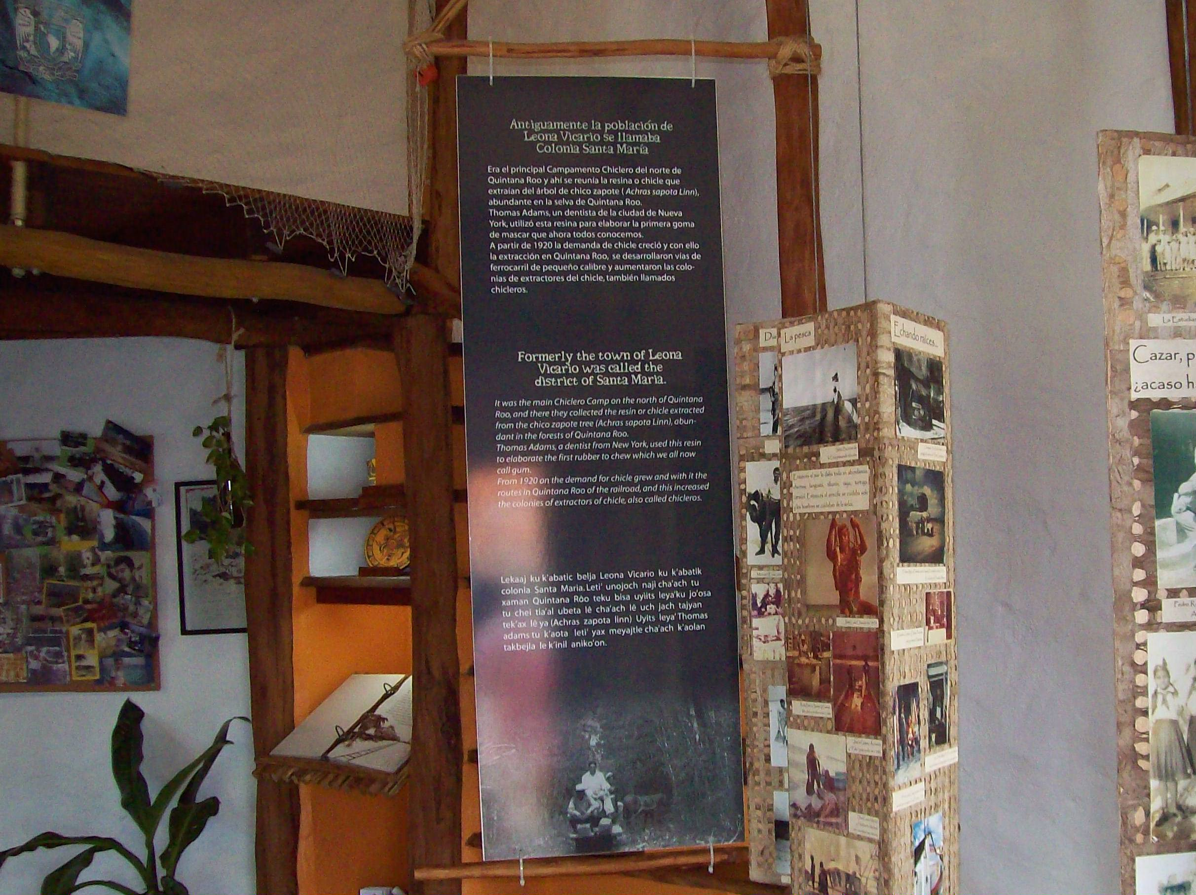 Interior del centro de visitantes del parque nacional arrecife de Puerto Morelos.